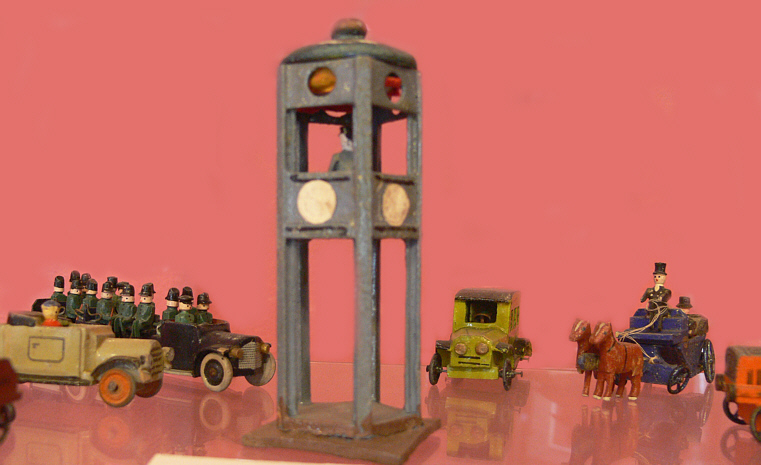 Sammlung Kindheit und Jugend (Stiftung Stadtmuseum Berlin) Spielzeugnachbildung des Verkehrsturmes am Potsdamer Platz, Berlin, um 1924